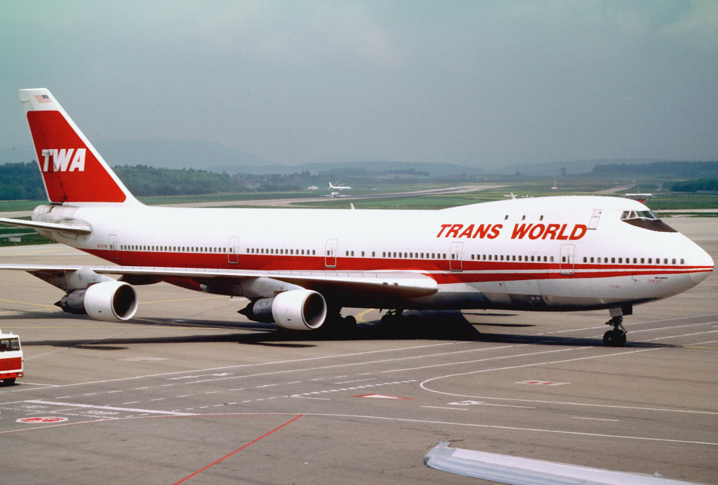 TWA Boeing 747-156; N133TW@ZRH, June 1987/ DVX